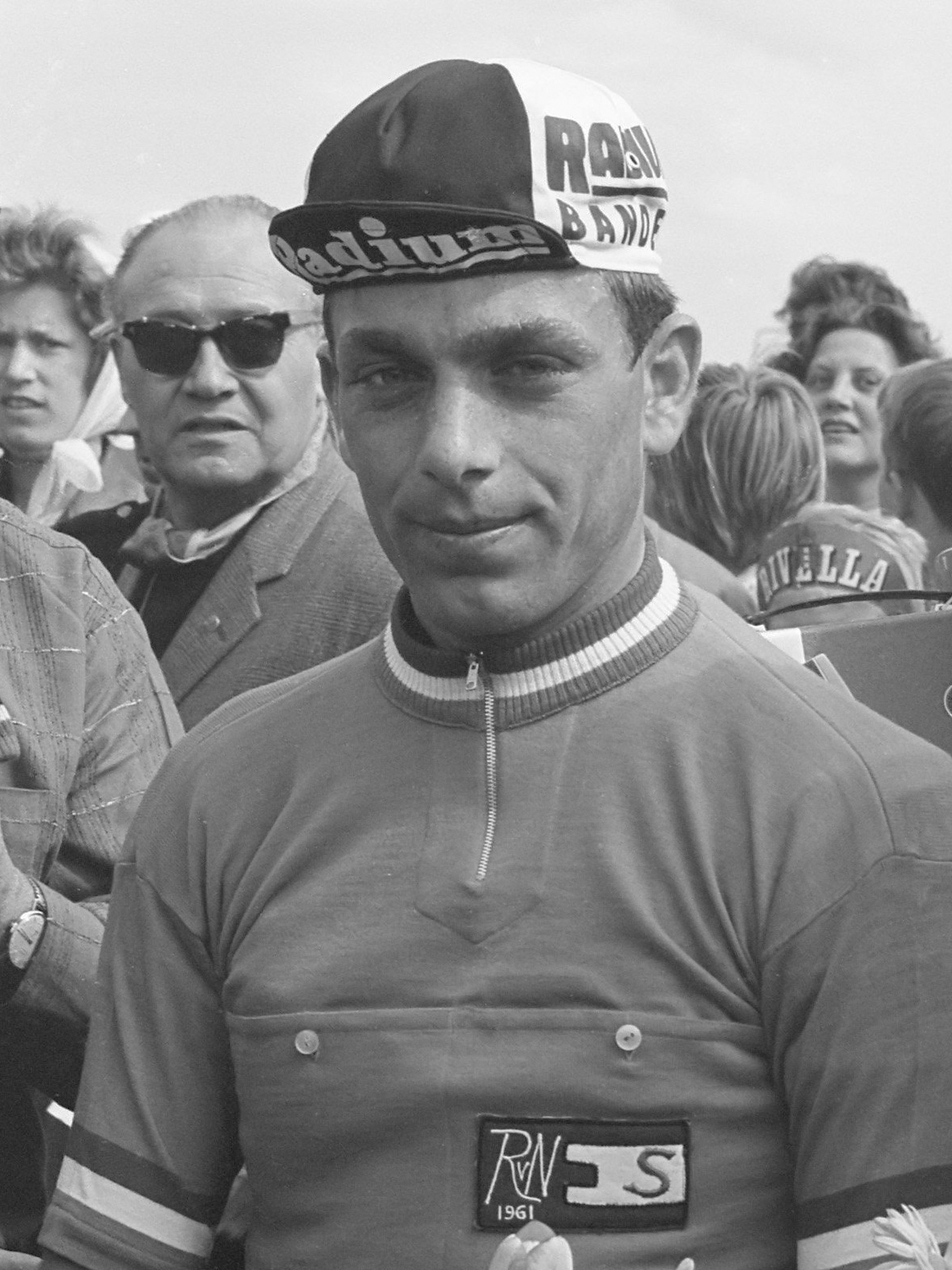 Ronde van Nederland in Utrecht begonnen. Finish Amsterdam. Jac. van der Klundert 16 mei 1961